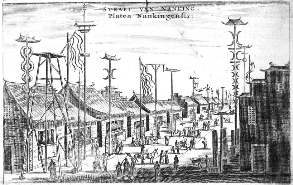 Nanking